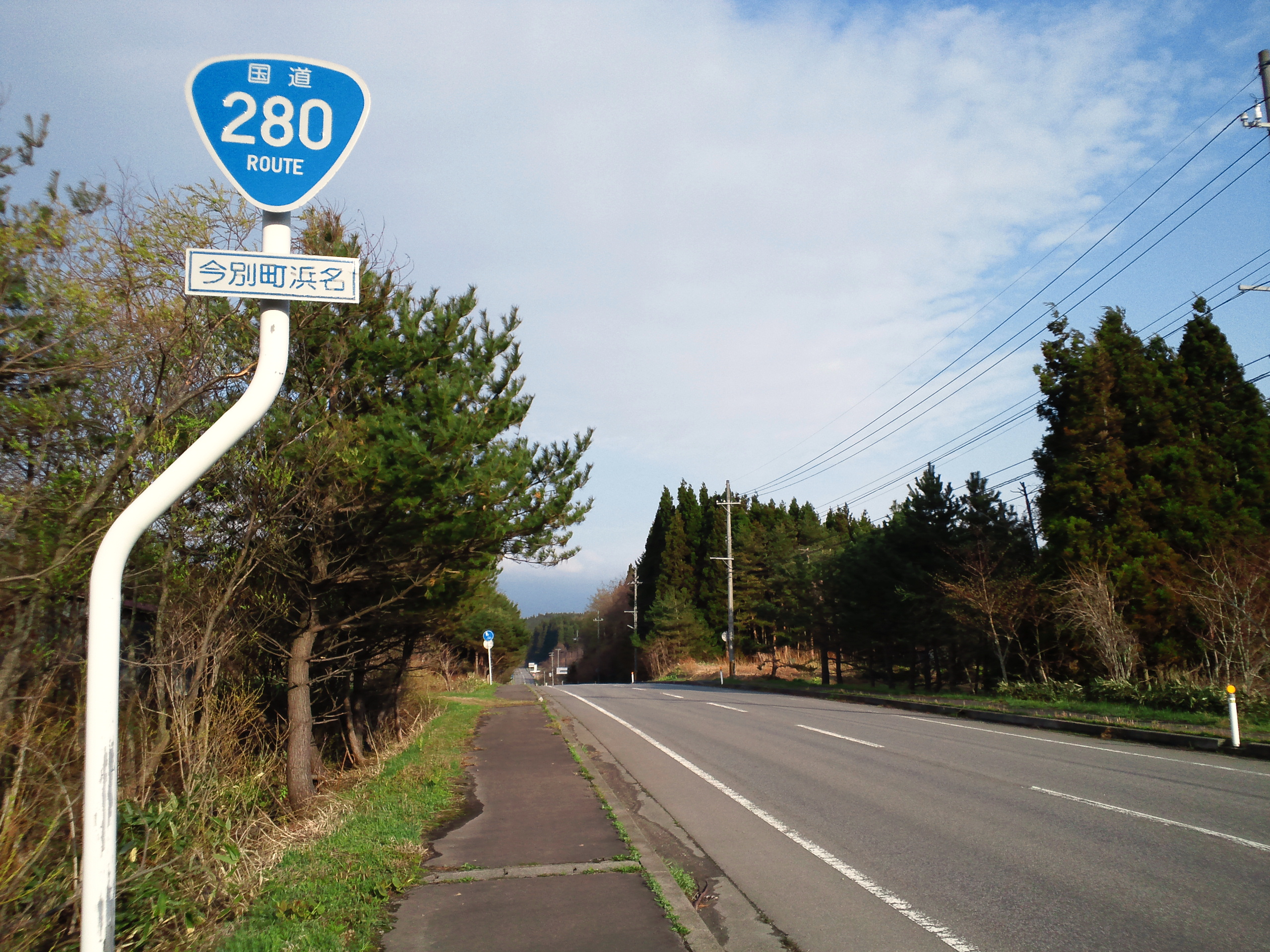 東津軽郡今別町の国道280号今別バイパス。